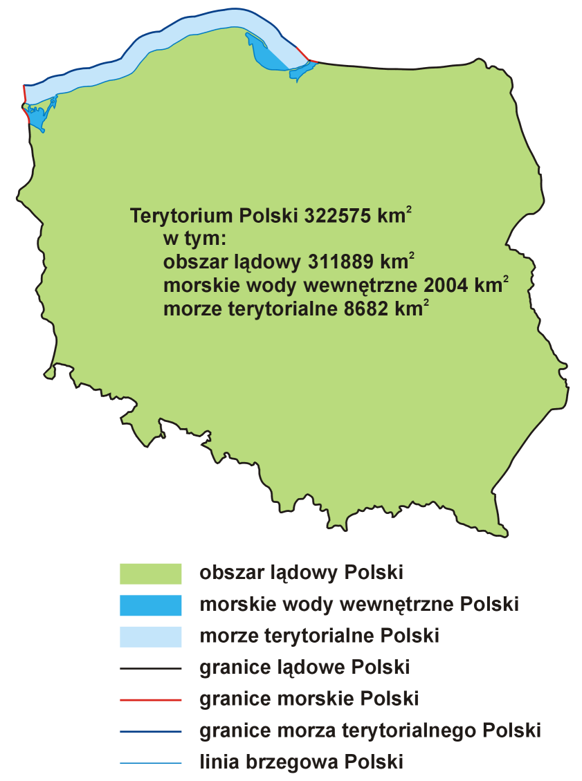 Mapa terytorium Polski w 2006 roku. Autor: Aotearoa